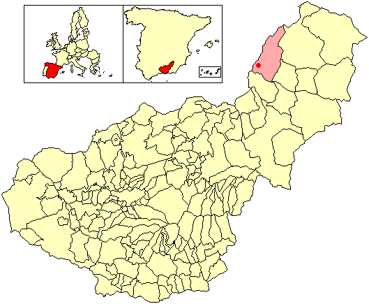 Situación de la localidad de Los Torres (en el municipio de Castril) respecto a la provincia de Granada, en España.